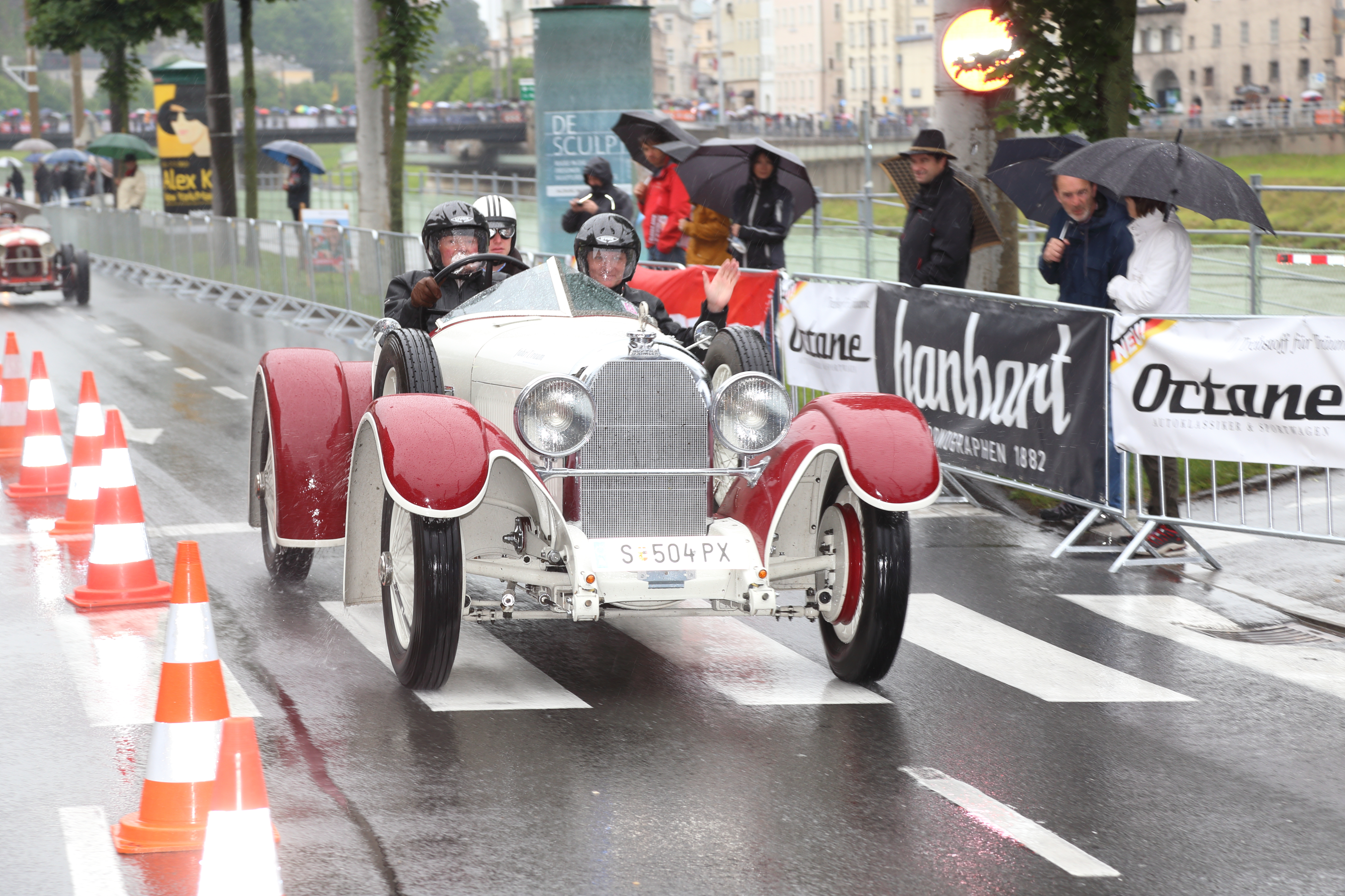 Gaisbergrennen 2013